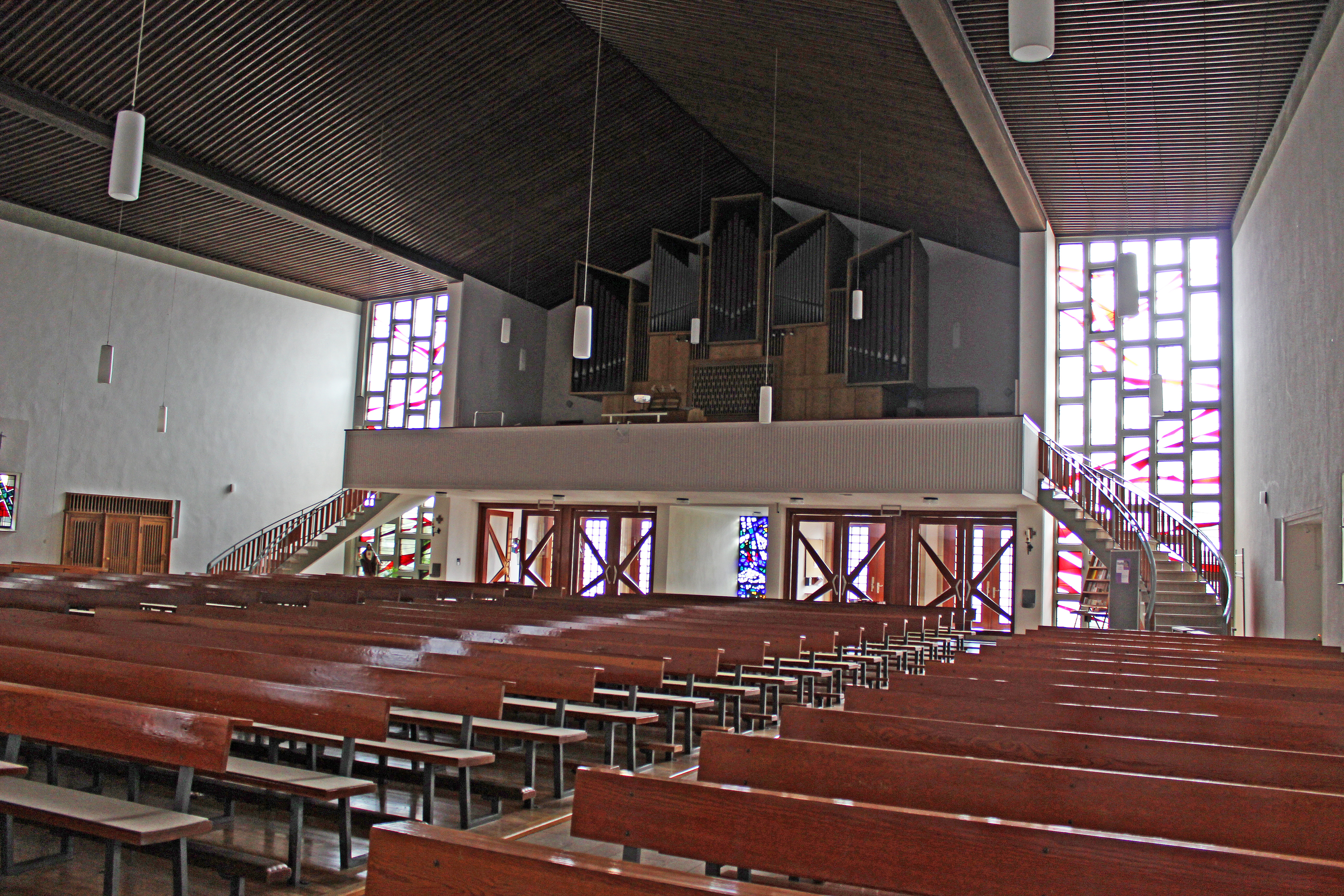 Blick ins Innere der katholischen Pfarrkirche St. Stephanus in Schmelz, Landkreis Saarlouis, Saarland